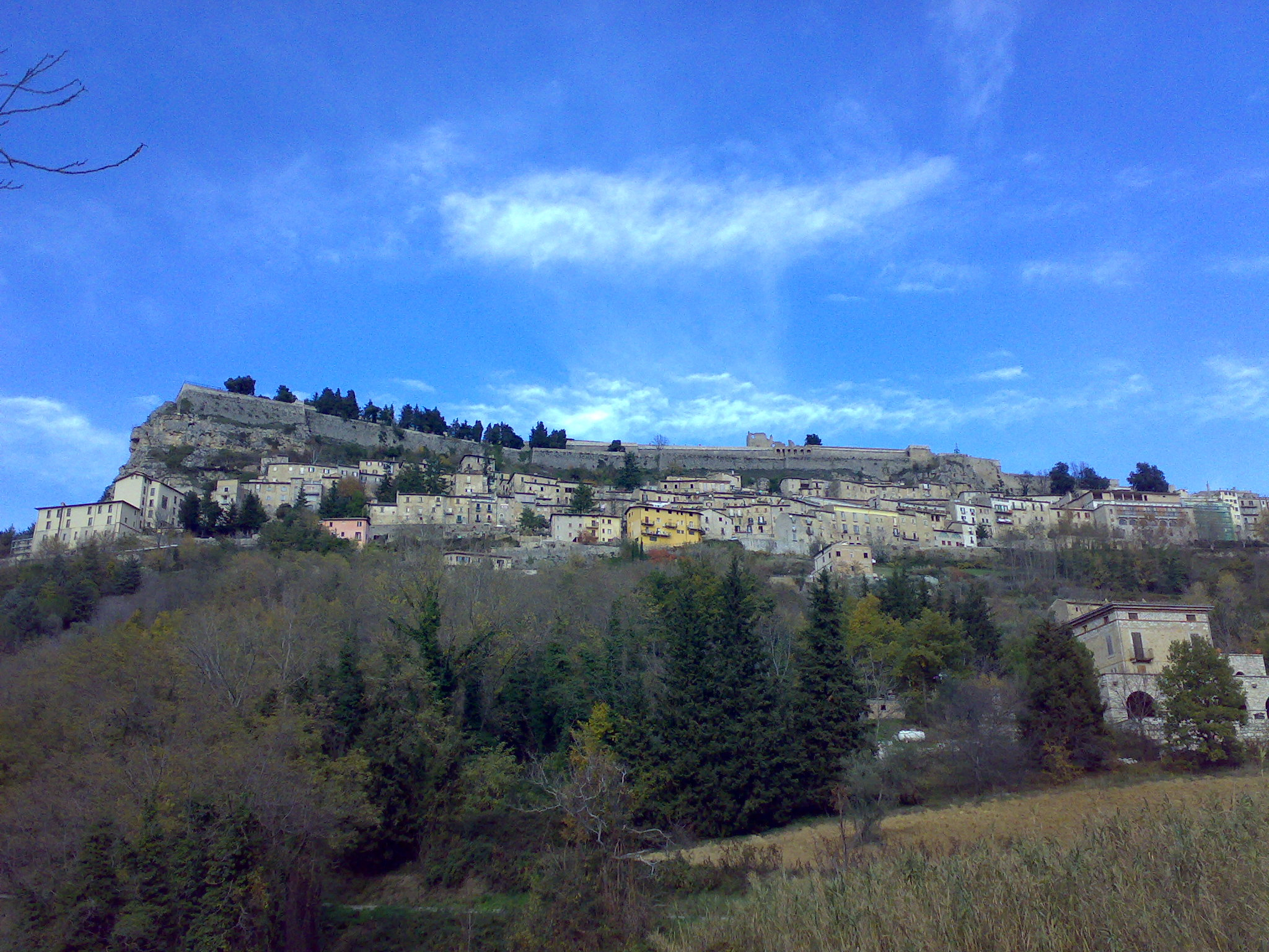 Panorama della cittadina di Civitella del Tronto